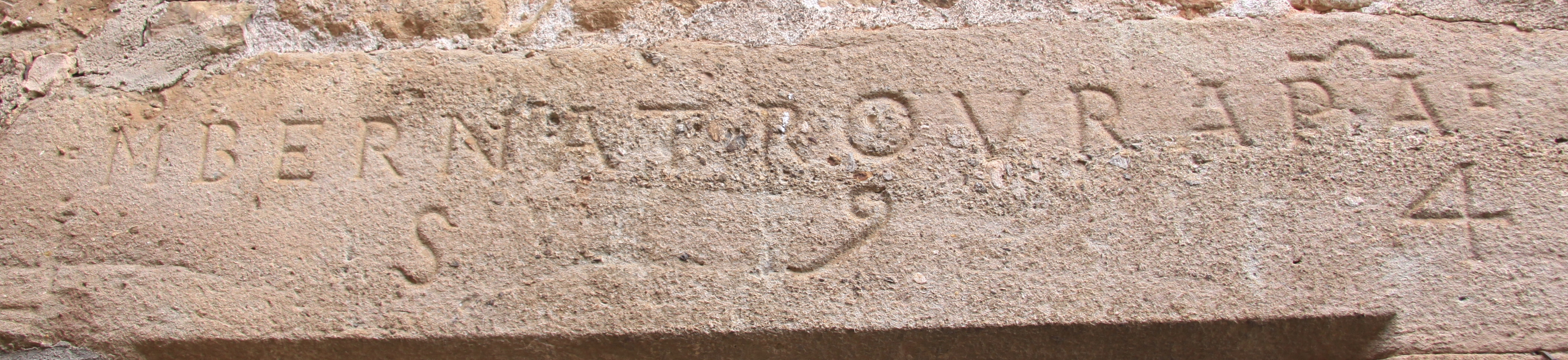 Dintell d'una casa del poble de Santa Pau (Girona)